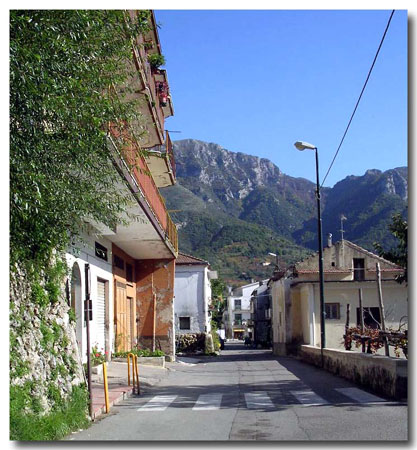 Piazza Polvica e via Roma.